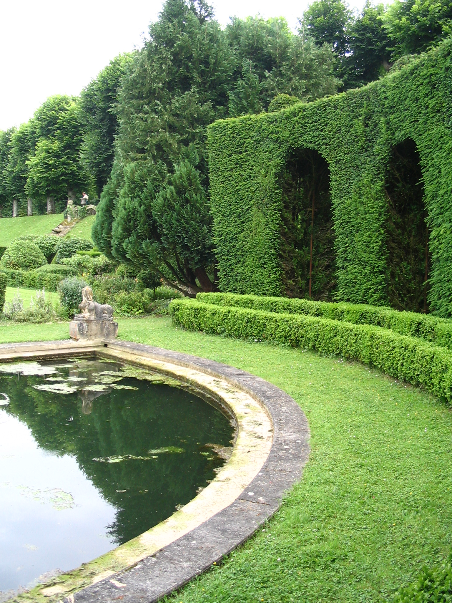 Chateau d'Ambleville, Val d'oise, France